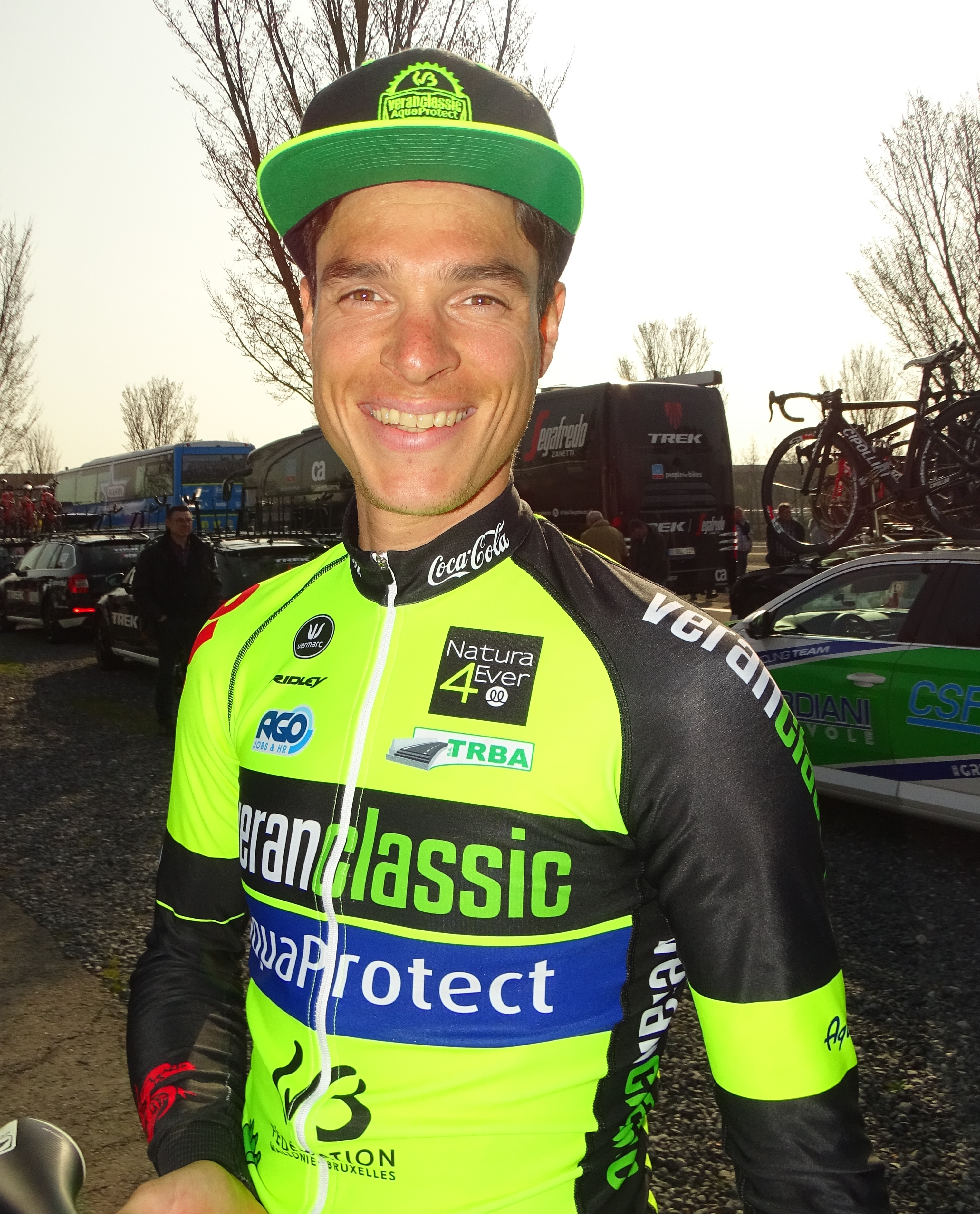 Reportage réalisé le mardi 28 mars à l'occasion de du départ de la première étape des Trois jours de La Panne 2017 à Adinkerque (La Panne), Belgique.